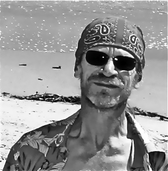 Leon Vitali